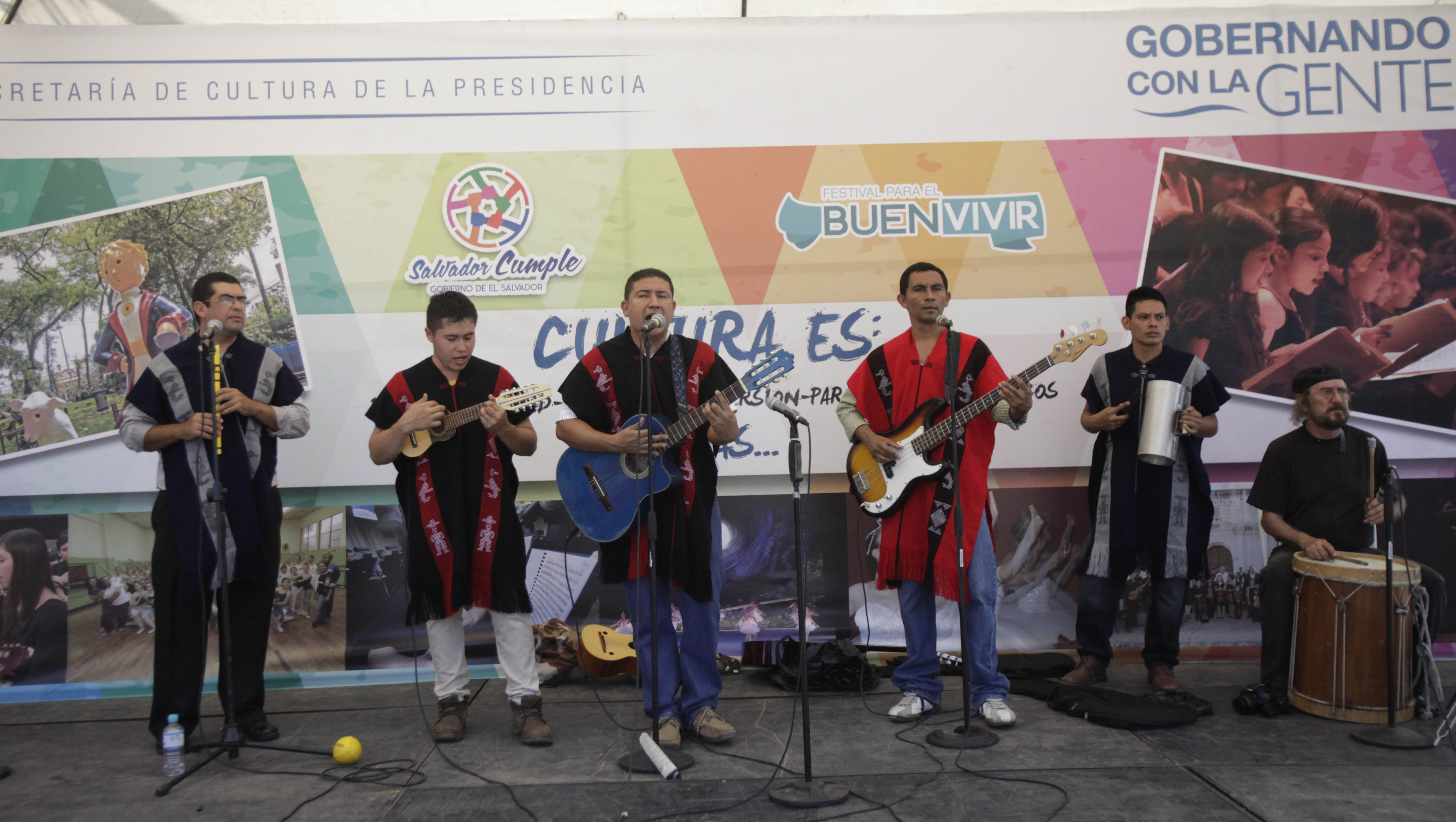 Grupo musical.